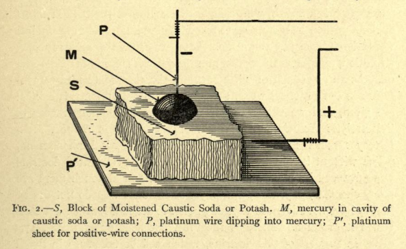 Schema dell'apparecchiatura di Davy per isolare sodio e potassio - Hopkins.